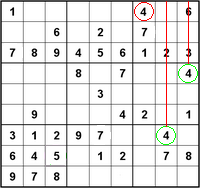 Stap 2.